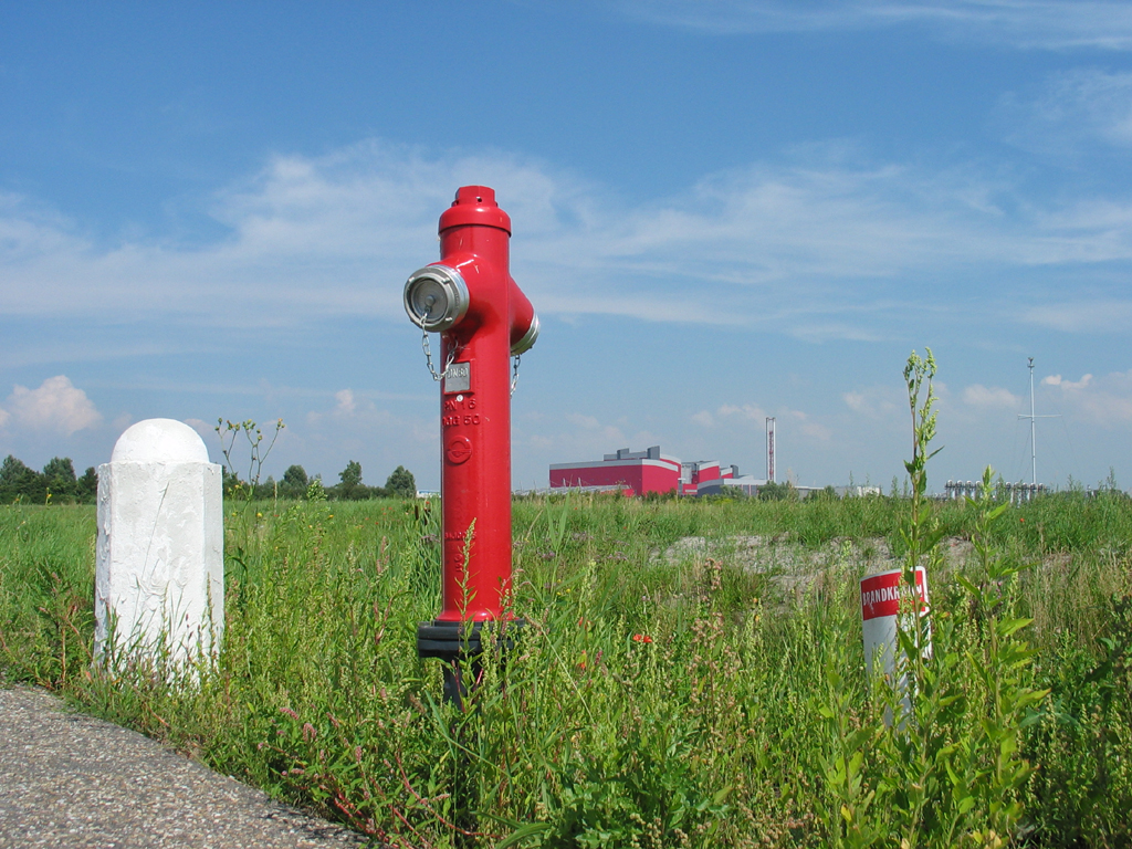 Brandkraan in Alkmaar, The Netherlands. Picture taken by Gerard Hogervorst.